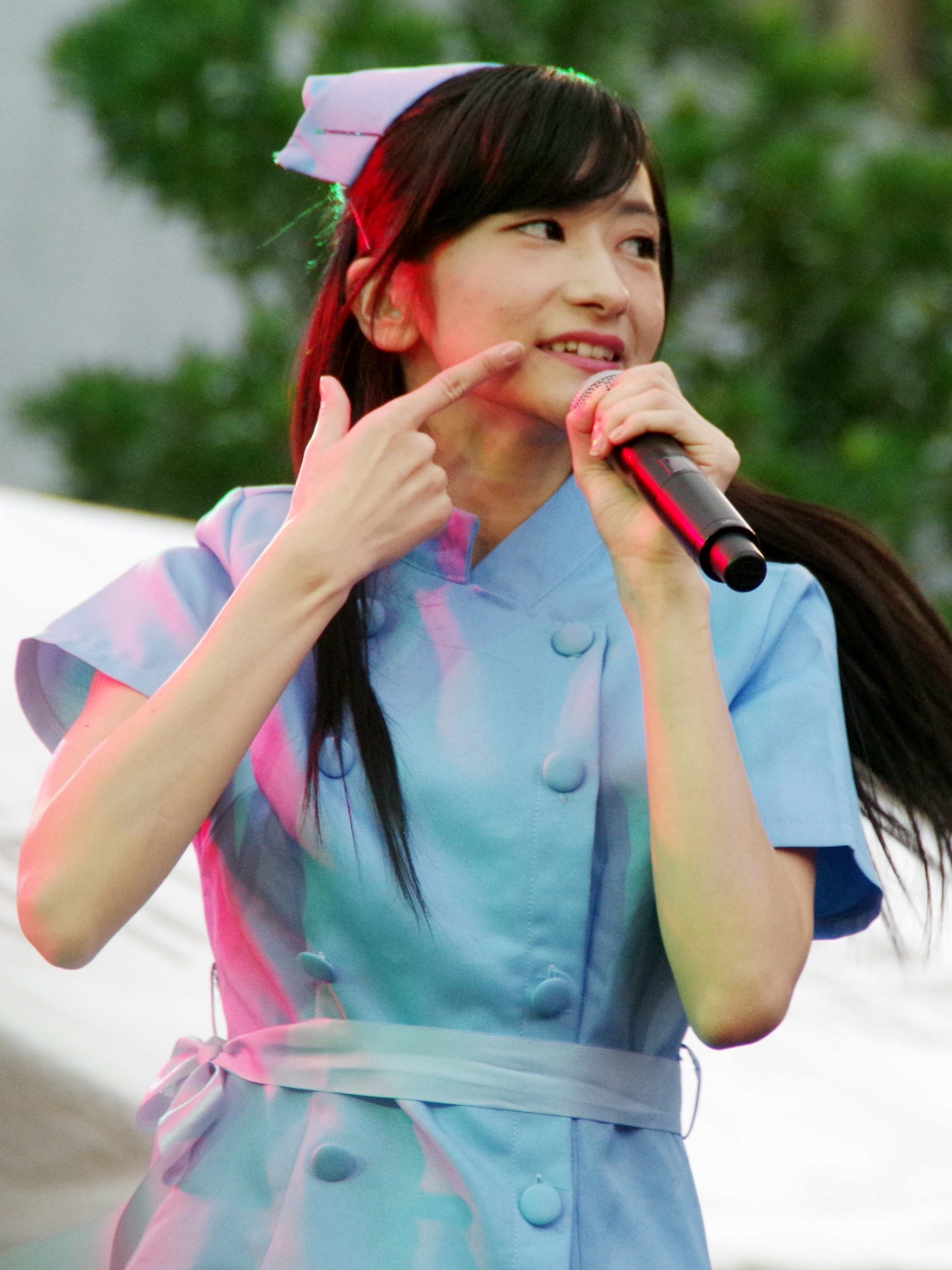 外崎梨香(Doll☆Elements) 撮影日: 2016年10月30日 撮影場所: 横浜市立大学 金沢八景キャンパス